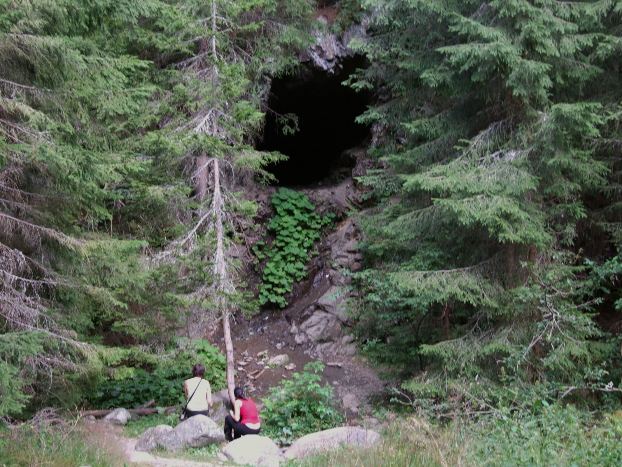 Otwór sztolni w Dolinie Żarskiej